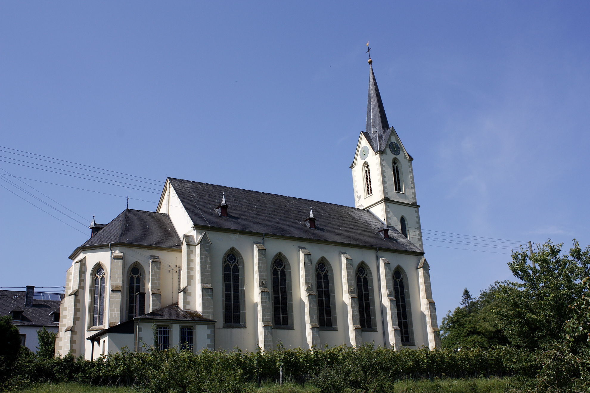 Pfarrkirche St. Vitus in Lösnich/Mosel. Erbaut 1879/80.